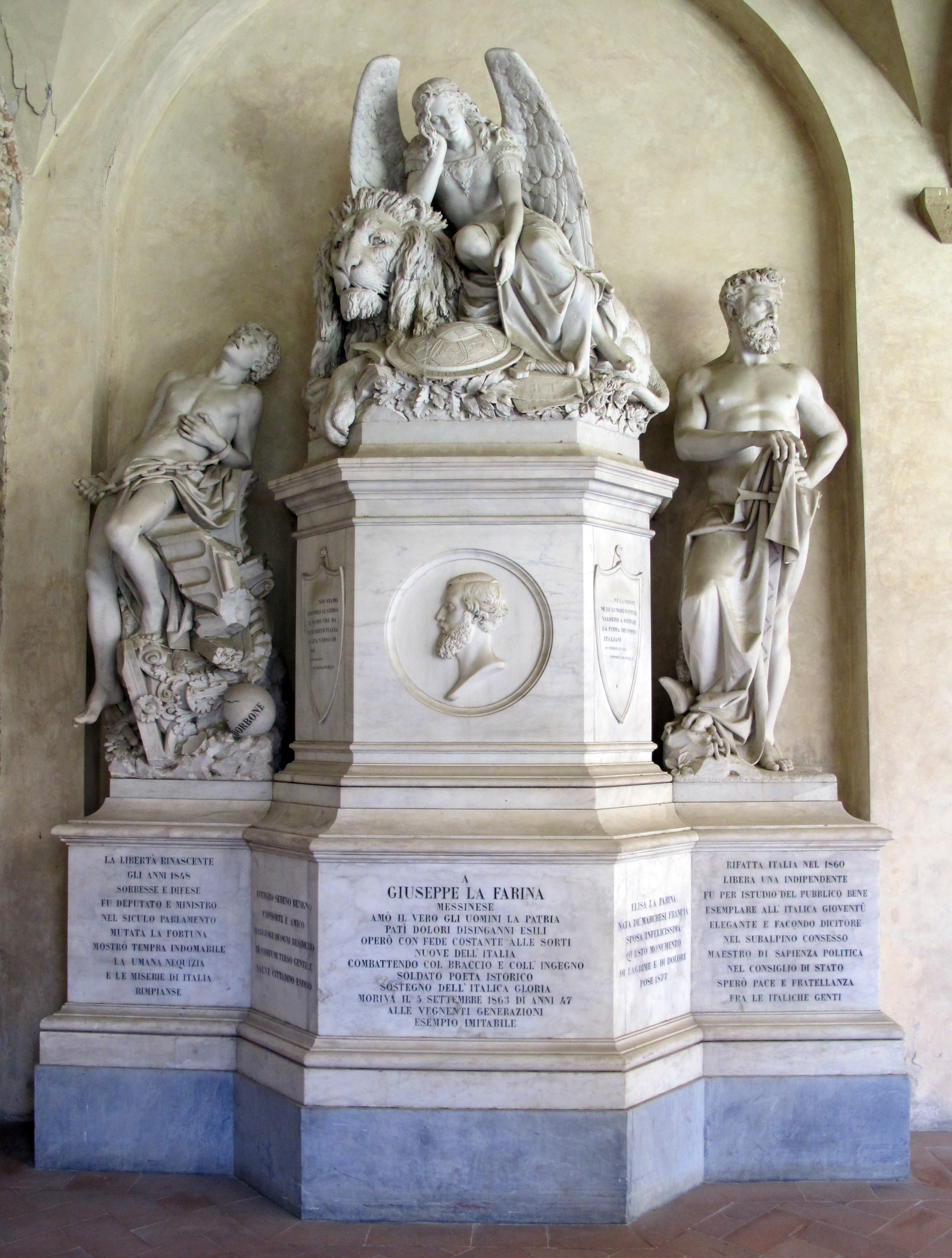 Primo chiostro, monumento a giuseppe la farina, di Michele Auteri Pomar, 1877